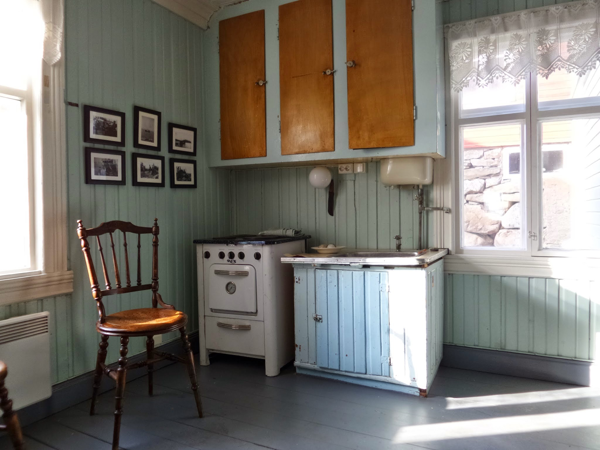 Fra Bietilægården i Vadsø - Varanger museum